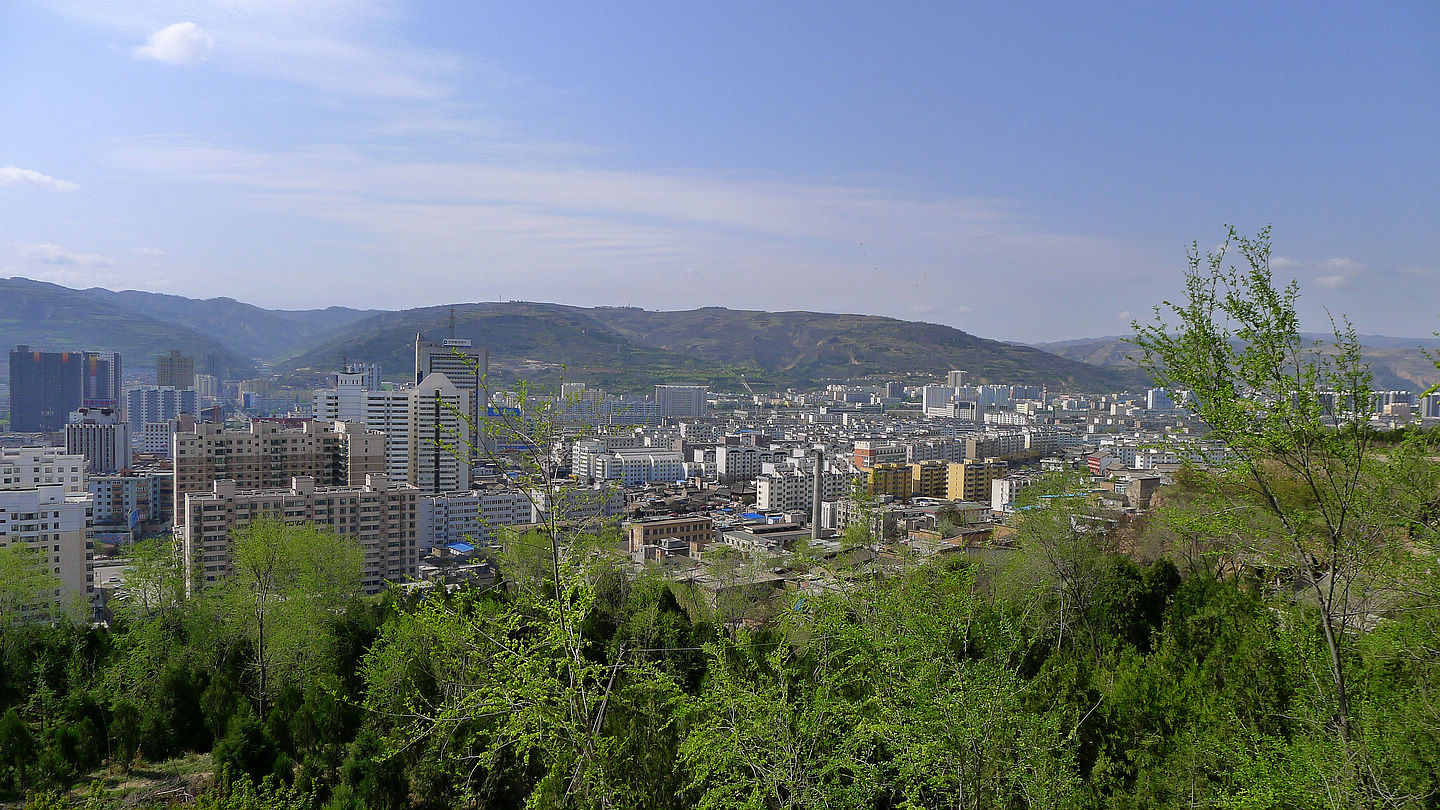 鸟瞰天水